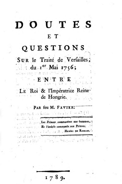 Titelblatt der [2.] Auflage der Denkschrift Doutes et questions sur le traité de Versailles du 1. Mai 1756; entre le roi et l'impératrice Reine de Hongrie von Jean-Louis Favier